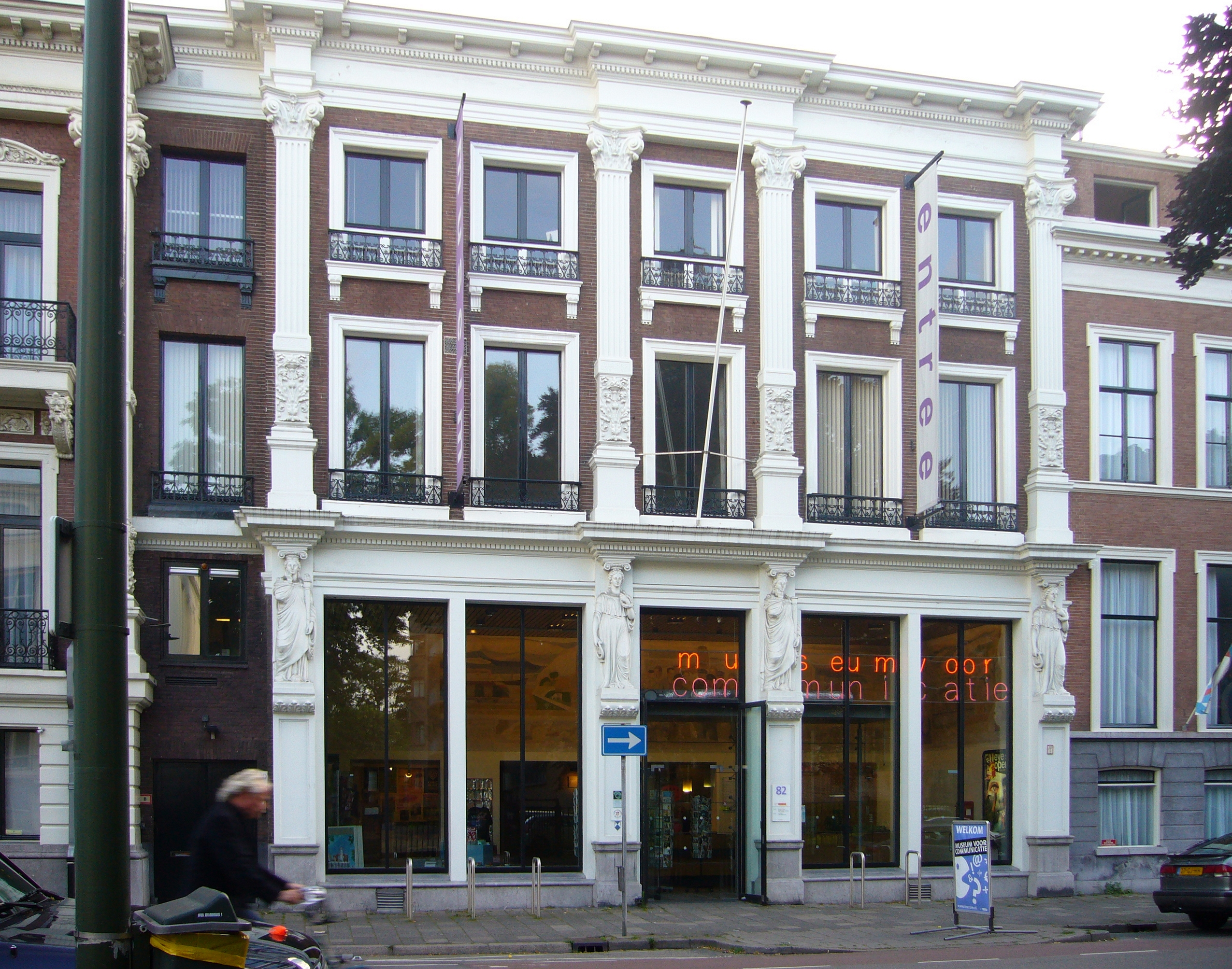 Museum voor Communicatie (vroeger PTT museum), Zeestraat, Den Haag